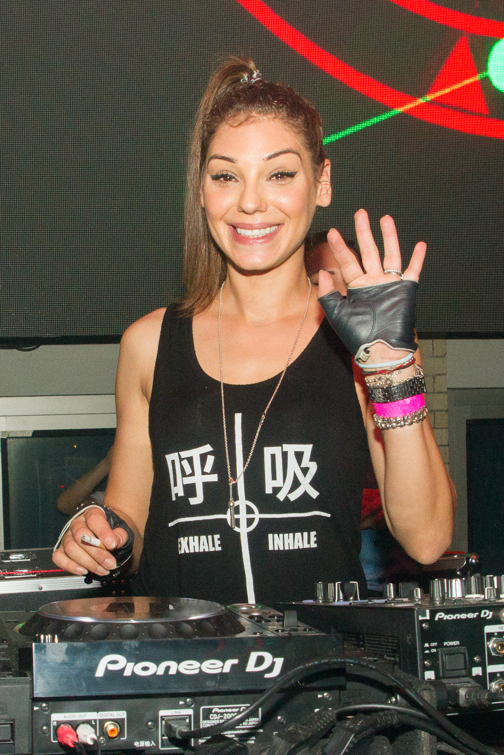 Ana Simina Grigoriu beim Steine und Bass Festival im Berliner E-Werk.